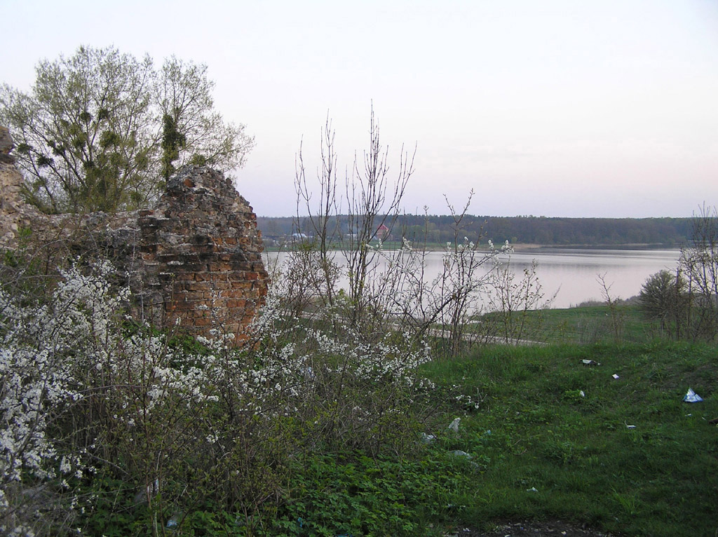 Руїни замку в селі Новомалин Острозького району Рівненської області